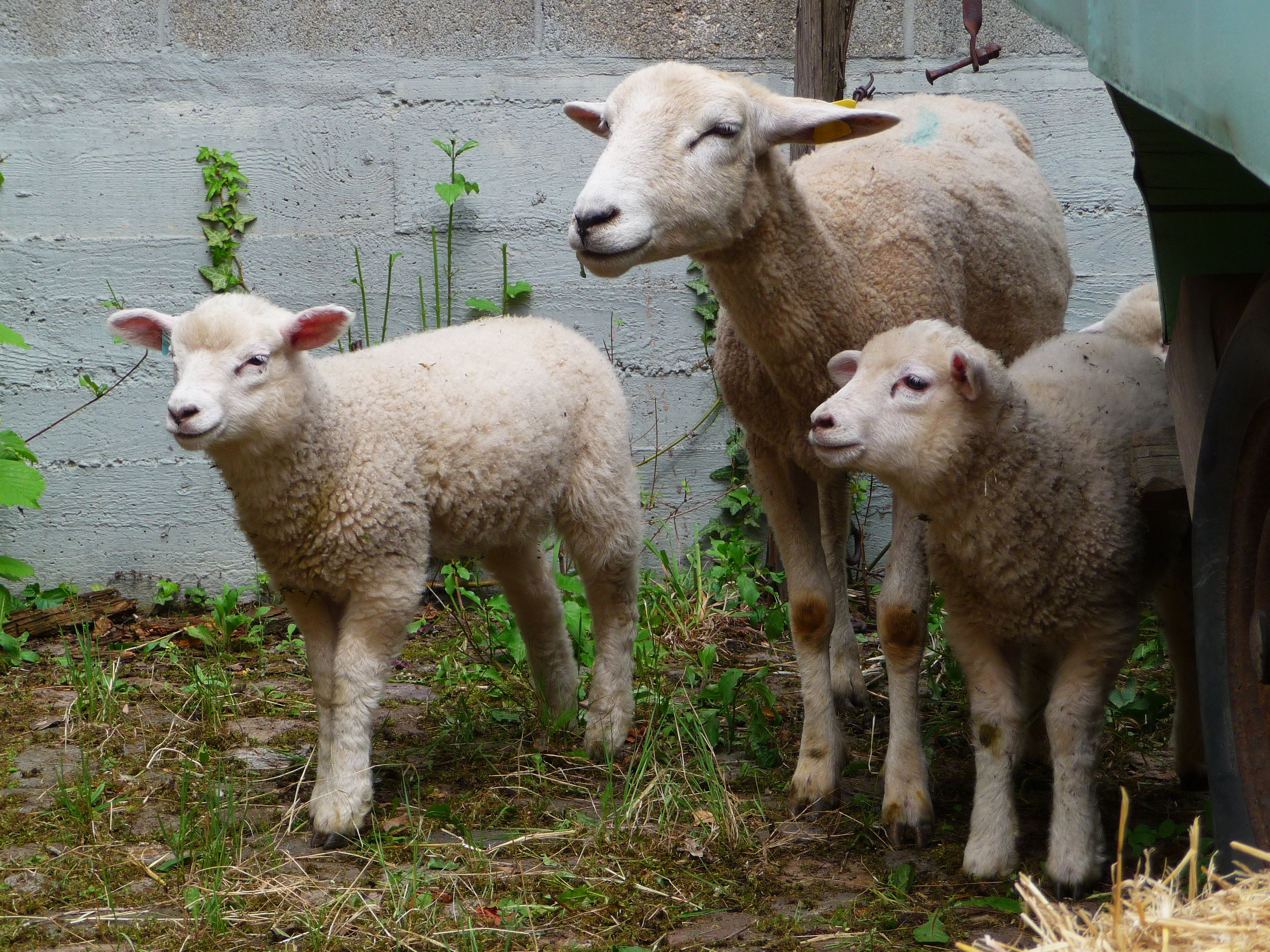 Merinoschaf mit zwei Anfang März 2010 geborenen Lämmern, fotografiert in Heidelberg (Baden-Württemberg, Deutschland)